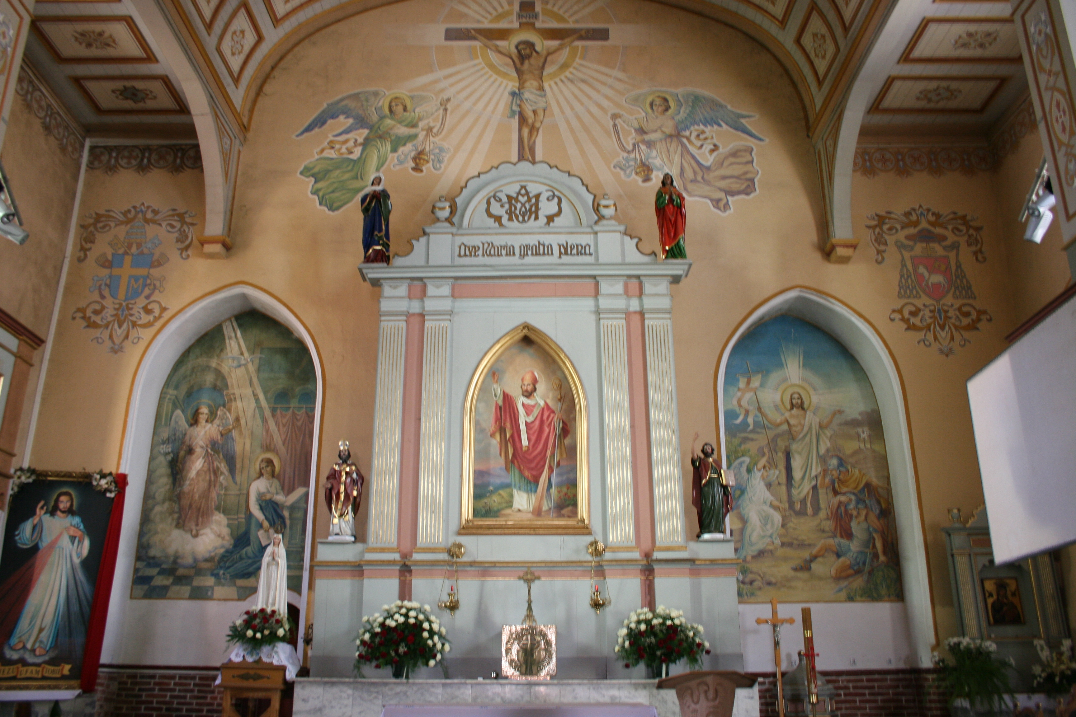 Nidzica, kościół rzym.-kat. par.p.w. św. Wojciecha i Niepokalanego Poczęcia NMP, kon. XIV, XVII, 1923-1924